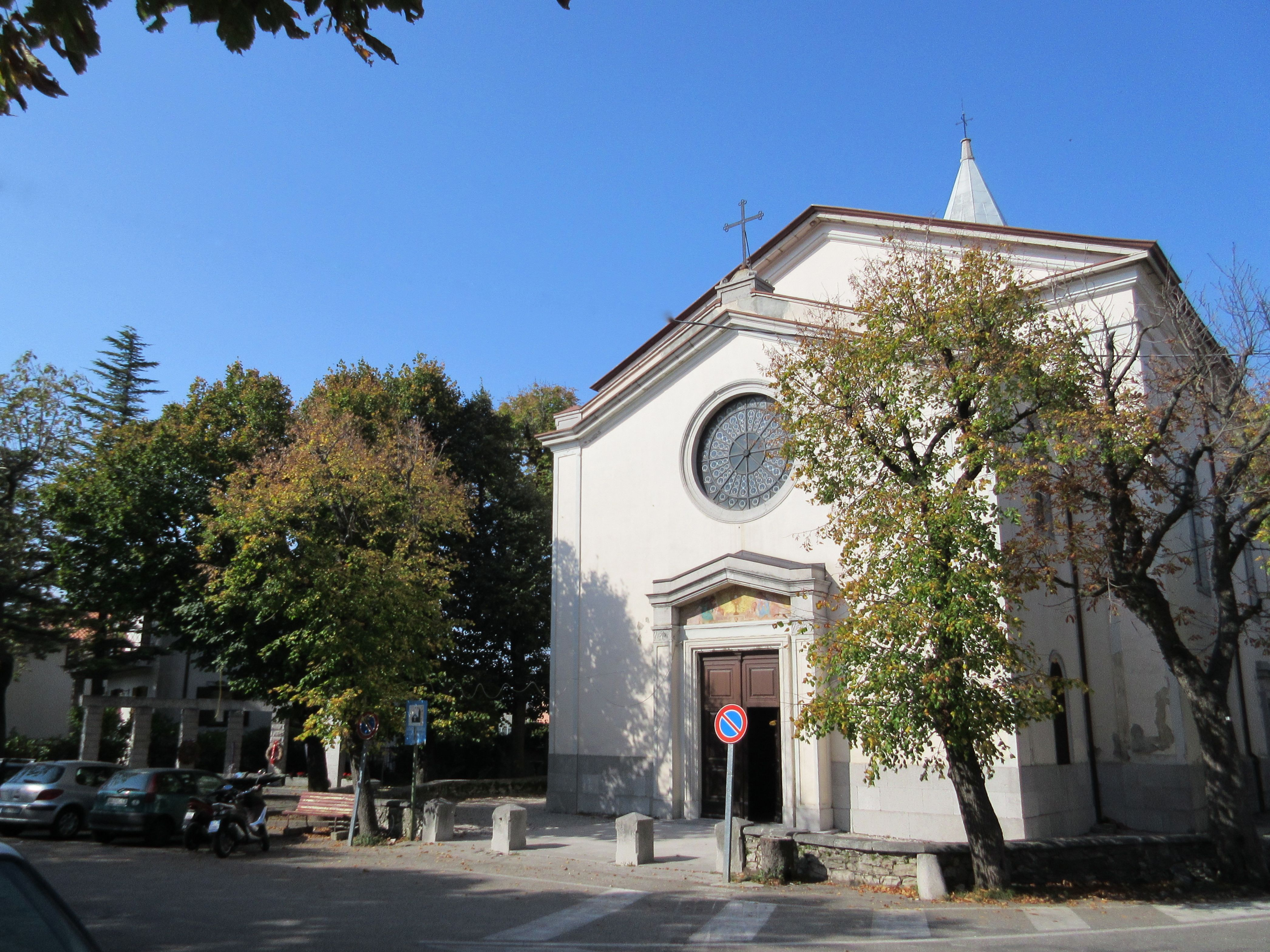 Italy - Trieste - Basovizza - Chiesa di Santa Maria Maddalena (1862) e monumento ai caduti